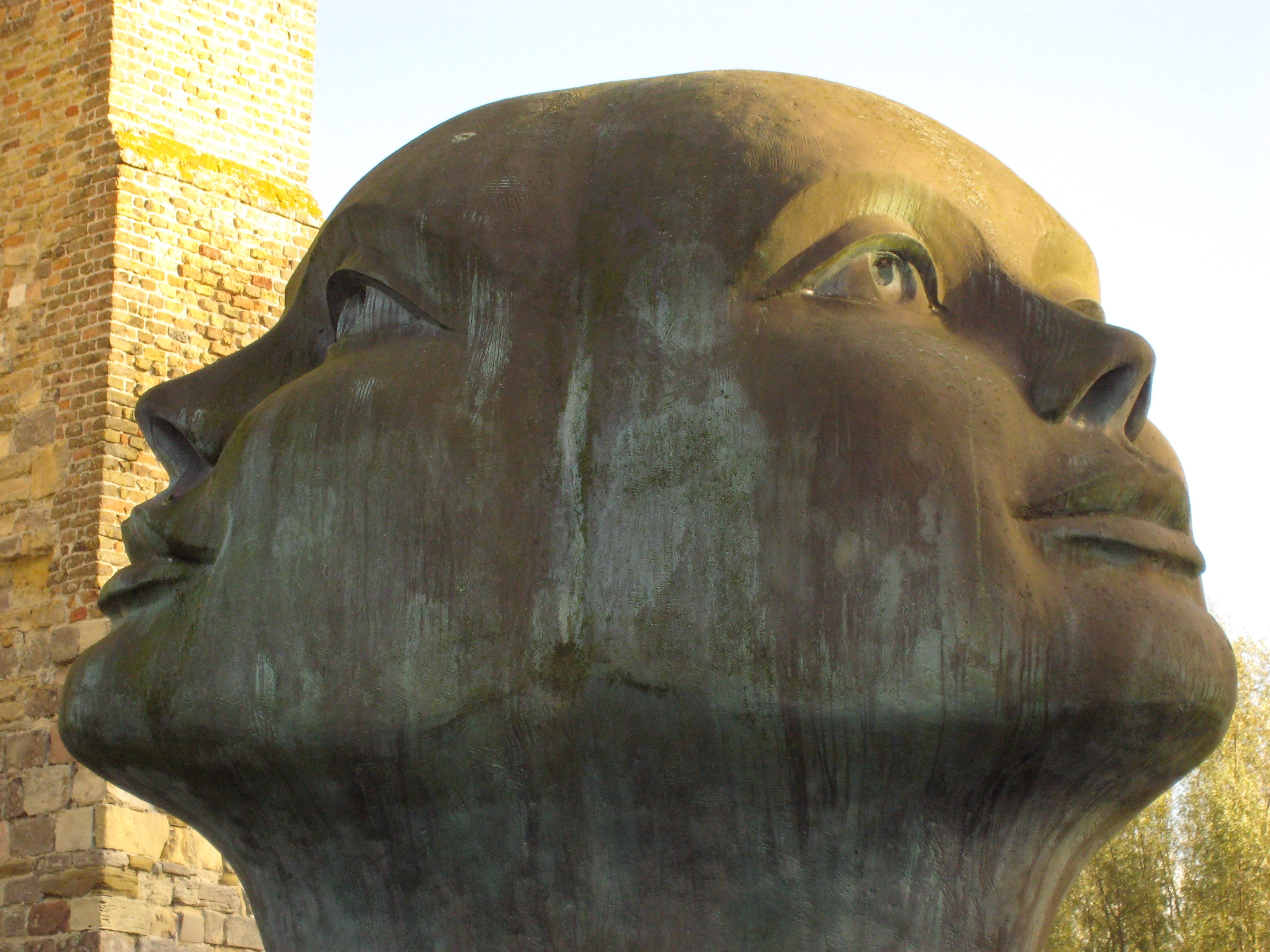 « Regard de lumière », sculpture d'une tête féminine à trois visages par Charles Delporte, devant Onze-Lieve-Vrouw à Damme